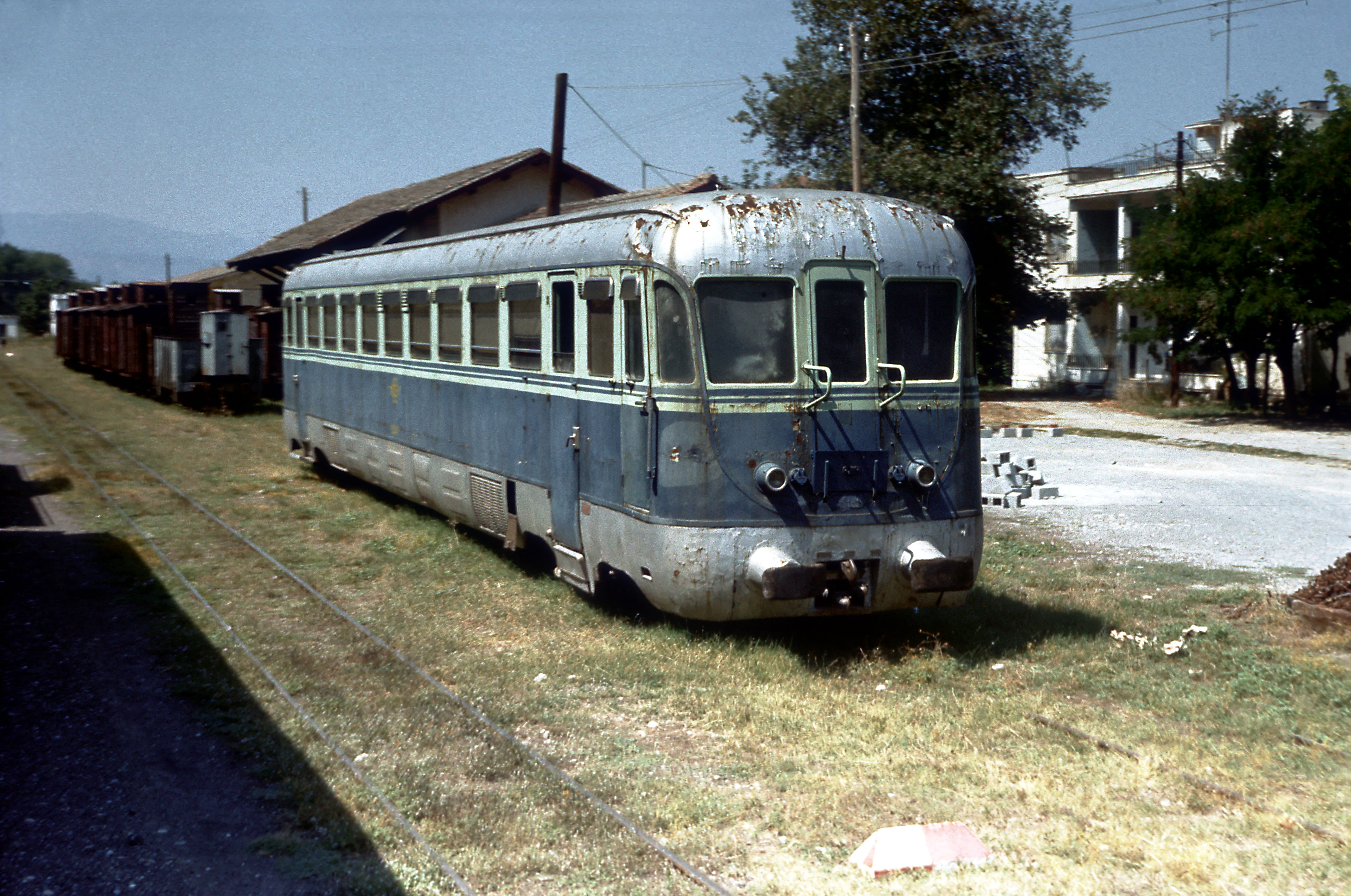 ein abgestellter Dieseltriebwagen, erbaut von Breda 1951, mit der typischen Puffer- und Kupplungsanordnung des thessalischen Meterspurnetzes, wie sie heute noch im tunesischen Meterspurnetz anzutreffen ist